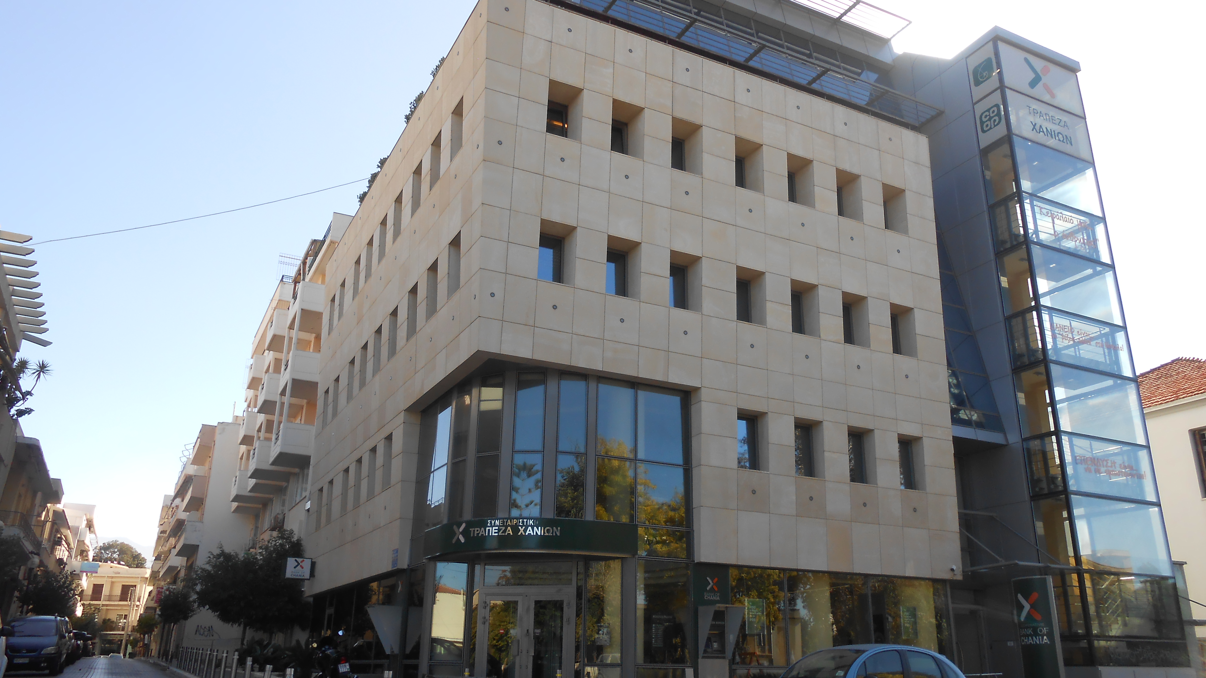 Eines der beiden Gebäude am Hauptsitz der 1993 gegründeten und 1995 eröffneten Genossenschaftsbank von Chania, unweit der Markthalle gelegen.